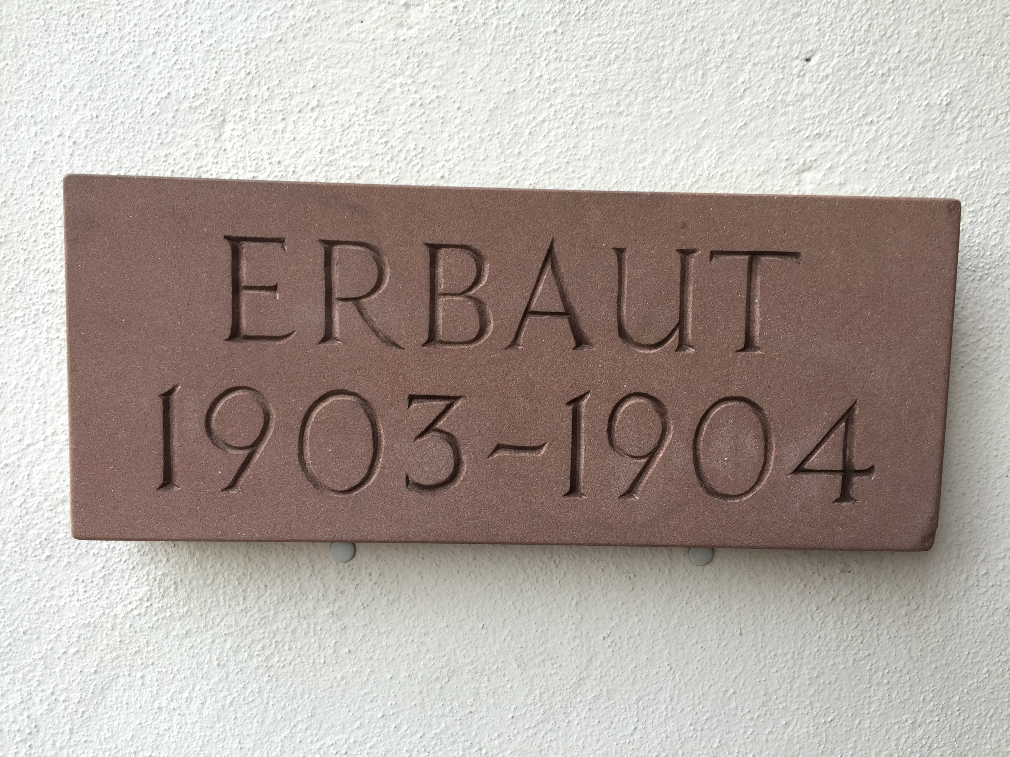 Pfarrkirche Zellhausen Baujahr